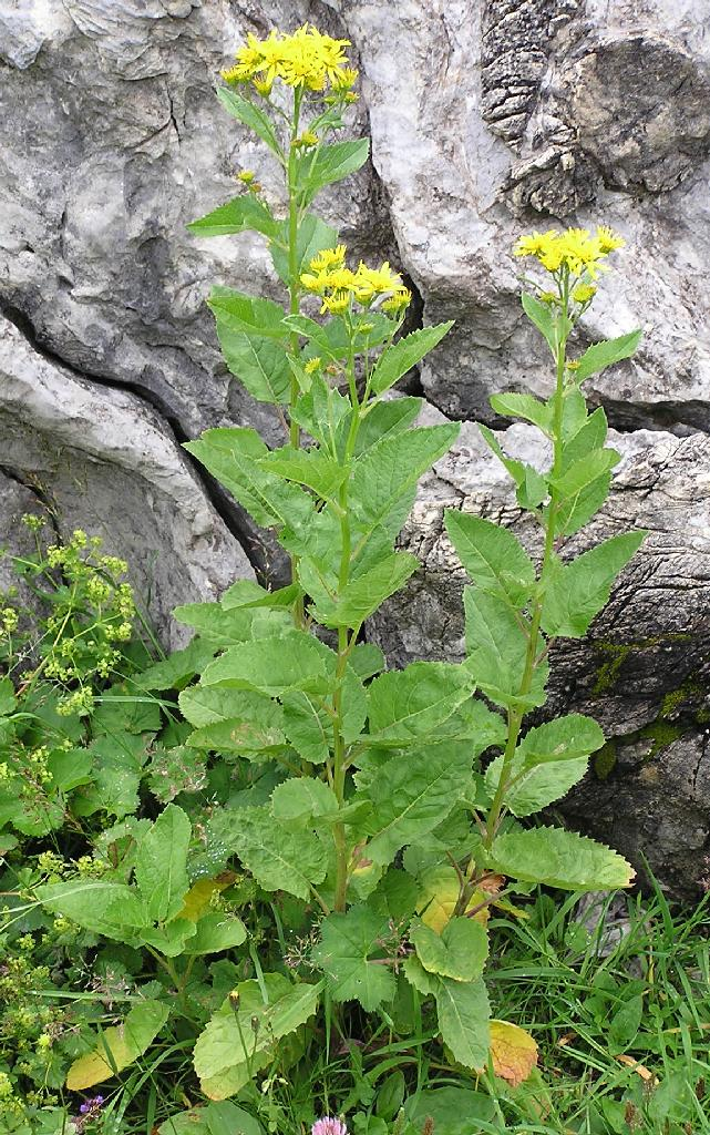 Alpen-Greiskraut (Senecio alpinus) am Formarinsee in Vorarlberg (Österreich)